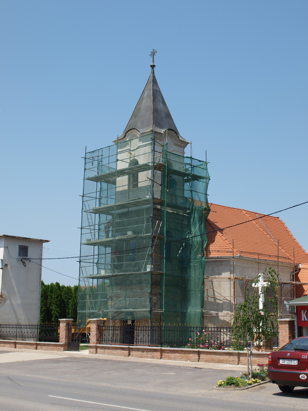 Crkva sv. Matije apostola u Čajkovcima, Brodsko-posavska županija.